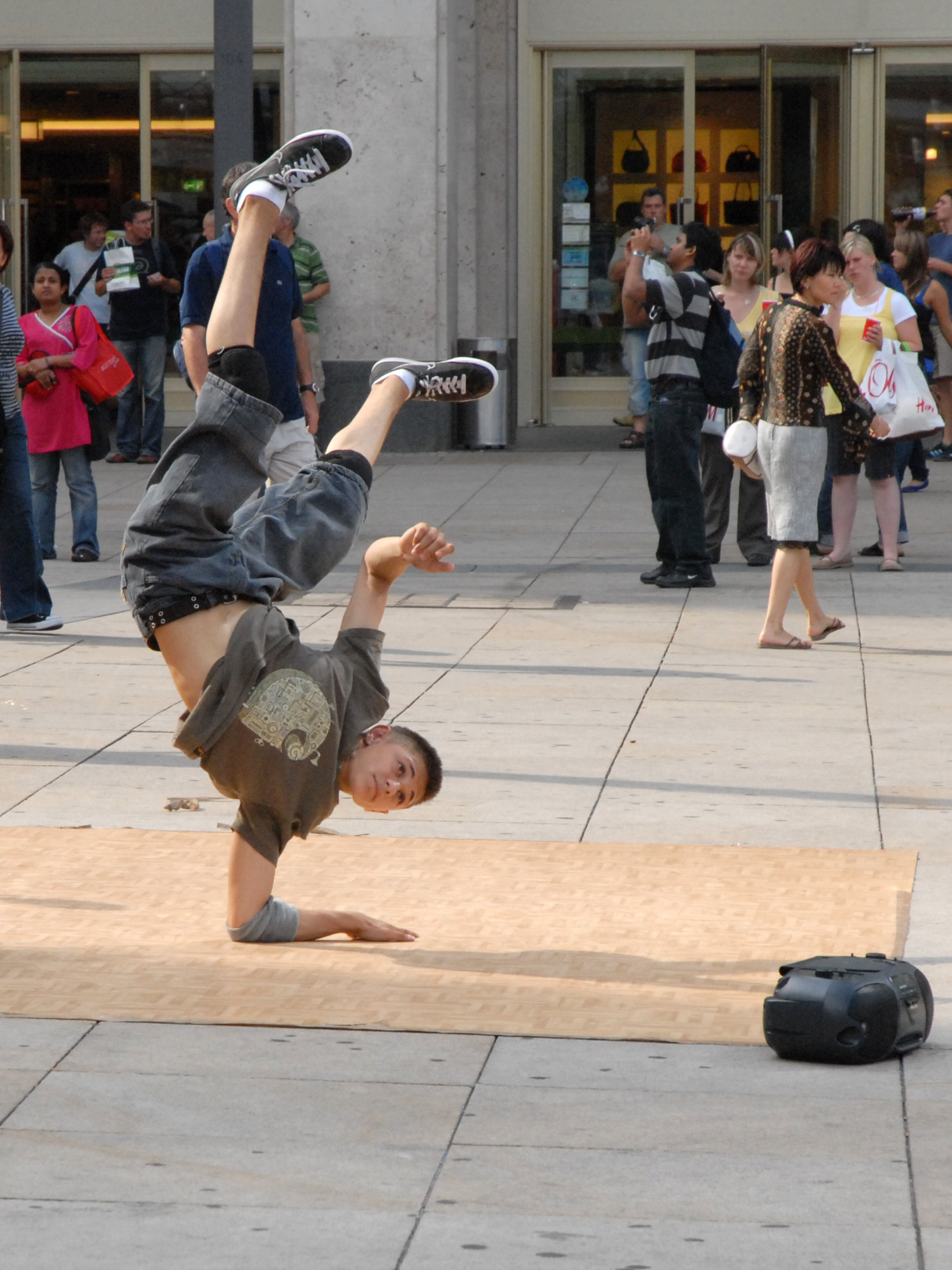 Danseur de Hip Hop sur l'Alexander Platz (Berlin)